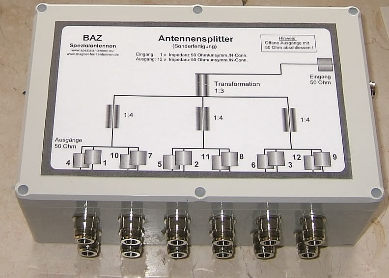 Antennensplitter